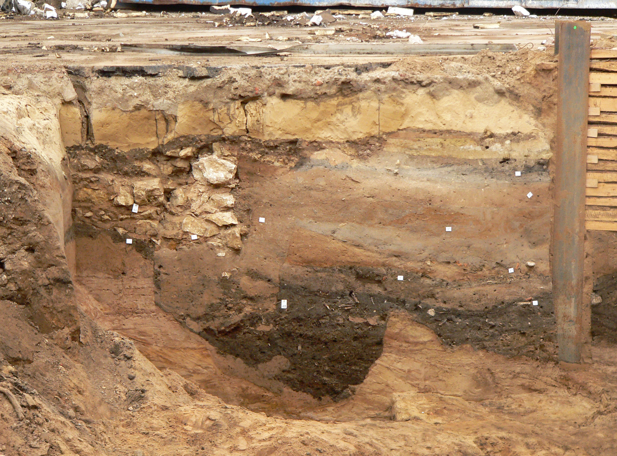 Ausgrabung am Hohen Ufer, Bodenschichten mit heller barocker Fundamentmauer links, darunter dunkle mittelalterliche Abfallgrube